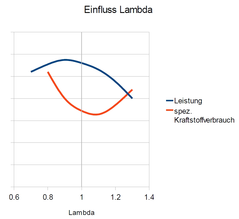 schematic Influence of lambda on power and fuel consumption